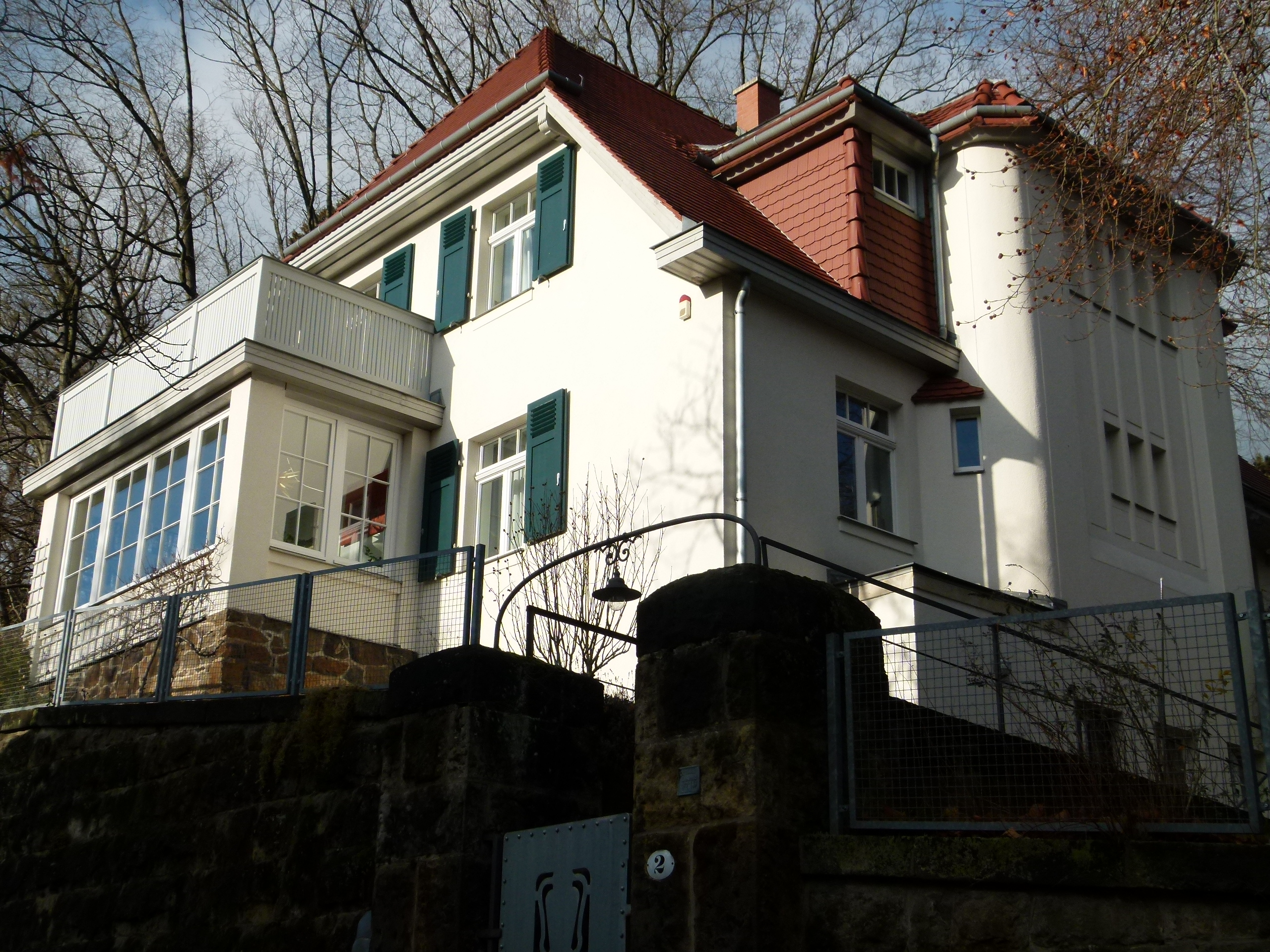 Denkmalgeschütztes Haus, Sonnenleite 2, Loschwitz, Dresden